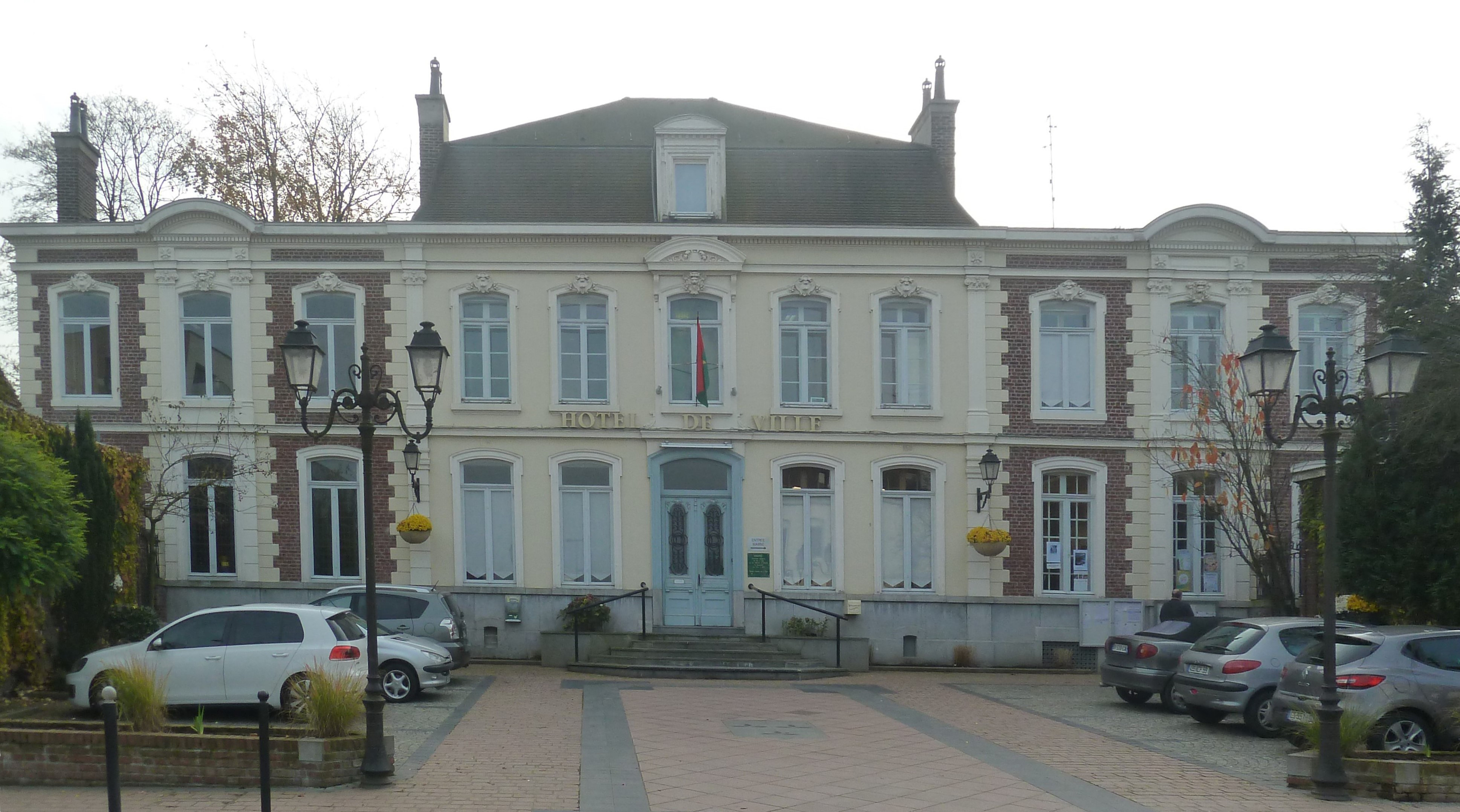 L'Hôtel de Ville de Bousbecque Nord (département_français)